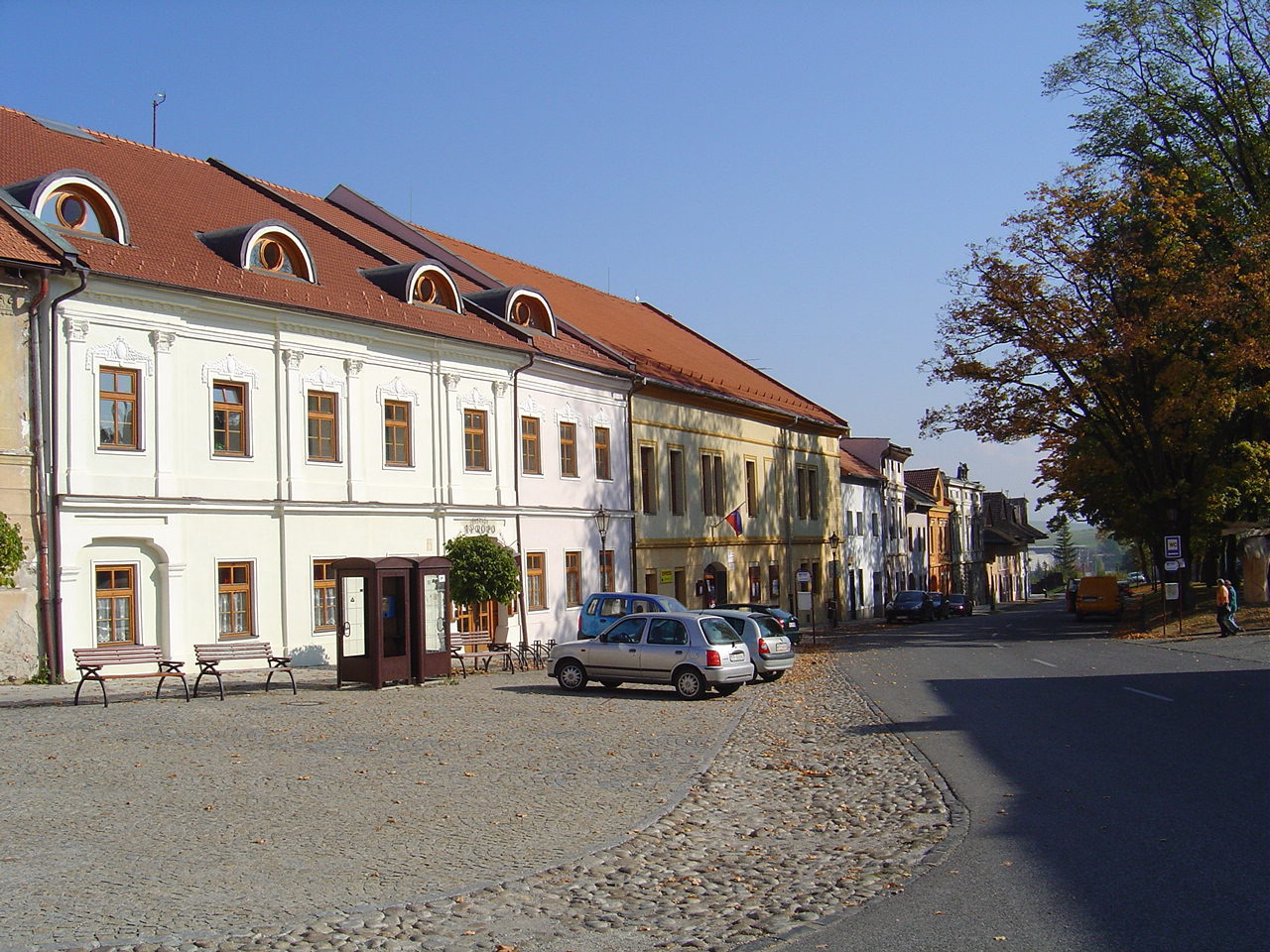 Spišská Sobota square